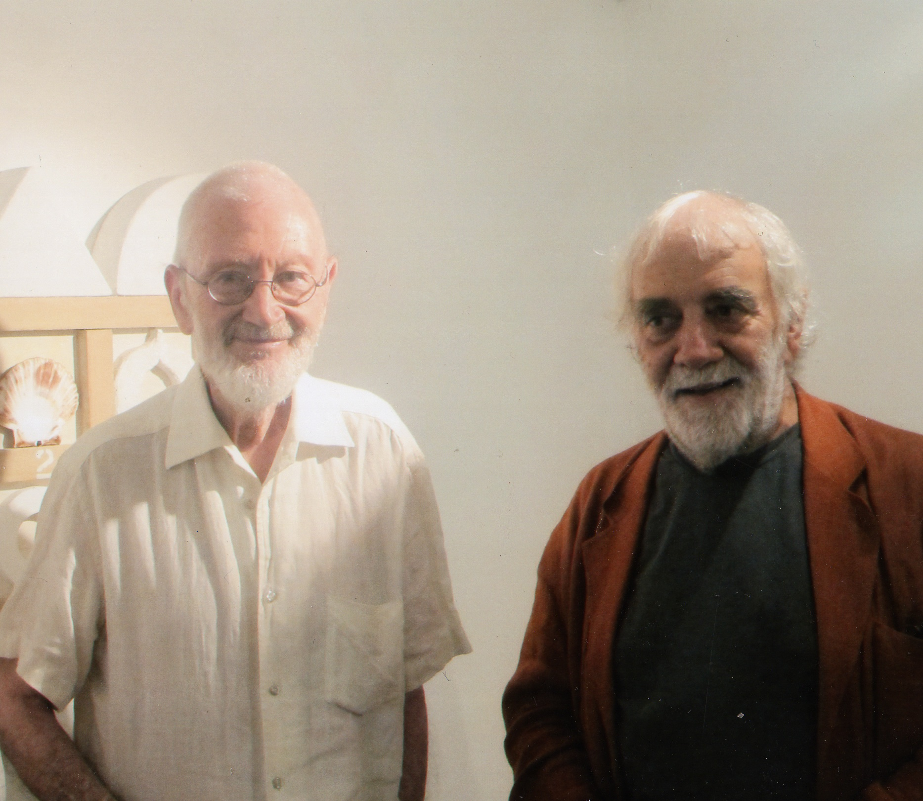 Il critico d'arte con il celebre artista inglese nel suo studio di Venezia